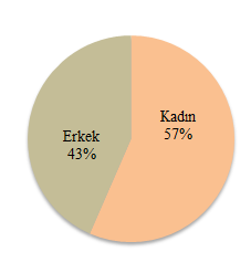 öğrenci dağılımı